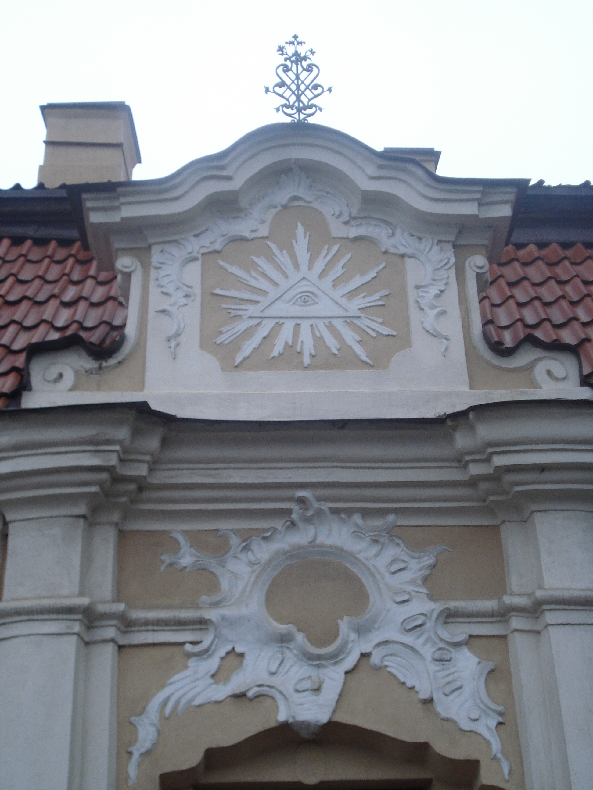 Cloister of Missionaries in Vilnius = Buvęs misijonierių vienuolynas = Klasztor misjonarzy w Wilnie (Subačiaus g.). Cartouche